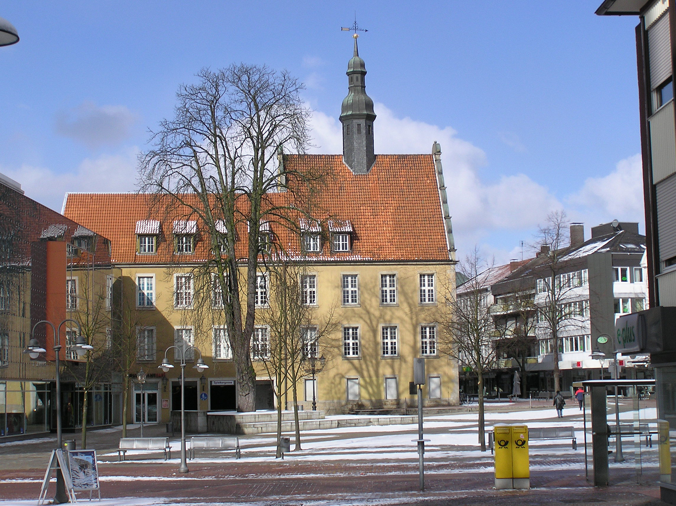 Berliner Platz in Gütersloh mit Blick auf das ehemalige Amtsgericht